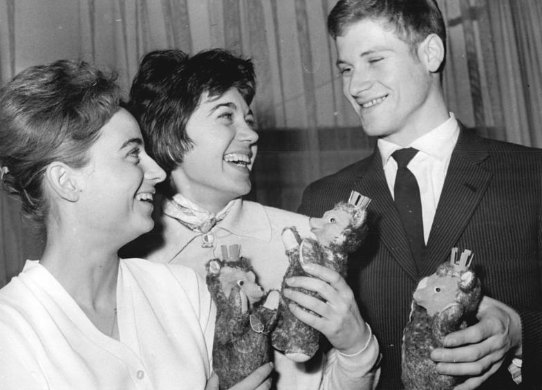 Nana Vosatkova, Helga Zöllner, Peter Göbel Zentralbild Hochneder 28.1.61 Berliner DTSB empfing Europameisterschafts-Teilnehmer. Einer Einladung des Bezirksvorstandes des DTSB von Groß-Berlin zu einem kurzen Zusammensein im Cafe "Budapest" in der Berliner Stalinallee folgten am 28.1.61 die Teilnehmer an den Eislauf-Europameisterschaften in Westberlin aus der CSSR, Ungarn und der DDR. Neben den Aktiven gehörten der Vorsitzende des Berliner DTSB-Bezirksvorstandes, Heinz Busch, DTSB-Sekretär Gunter Heinze, der Präsident des Deutschen Eislaufverbandes, Heinz Dragunsky und der Stadtrat für Volksbildung und Sport, Lengsfeld, zu den prominentesten Gästen. (Näheres siehe ADN-Meldung 607 vom 28.1.61) UBz: Als kleine Erinnerung an die Stadt Berlin wurden den Teilnehmern an den Eislauf-Europameisterschaften vom Bezirksvorstand des DTSB das Wahrzeichen der Hauptstadt der DDR, ein Berliner Bär, überreicht. (vlnr) Nana Vosatkova (CSSR), Helga Zöllner (Ungarn) und Peter Göbel (DDR).